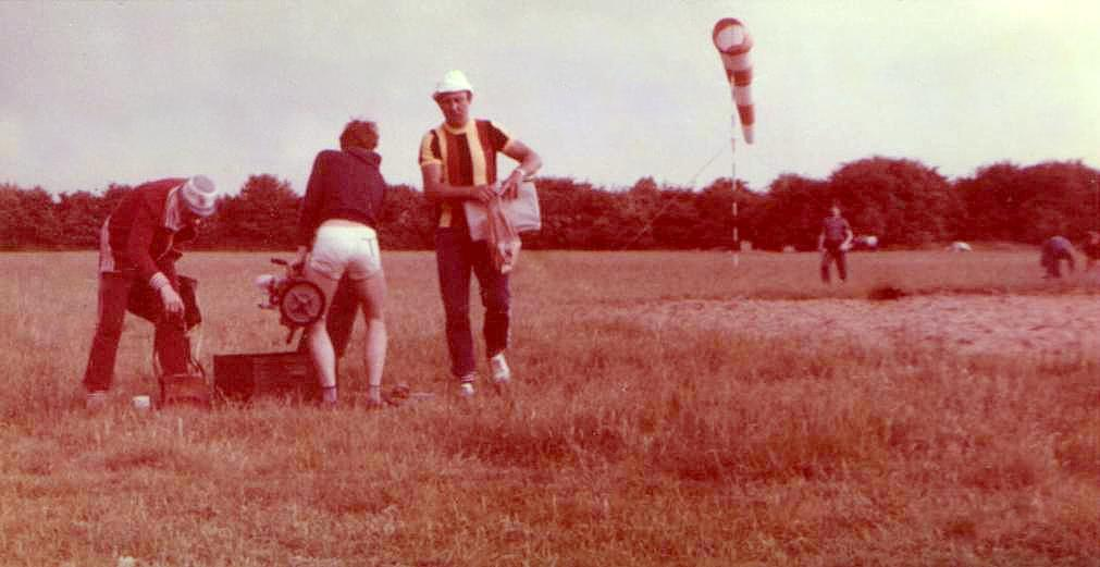 XVI Spadochronowe Mistrzostwa Śląska 1985. Sędziowie zawodów Krystian Kaik i Janusz Furtak montują swoje stanowisko do prowadzenia obserwacji - Sekcja Spadochronowa Aeroklubu Gliwickiego